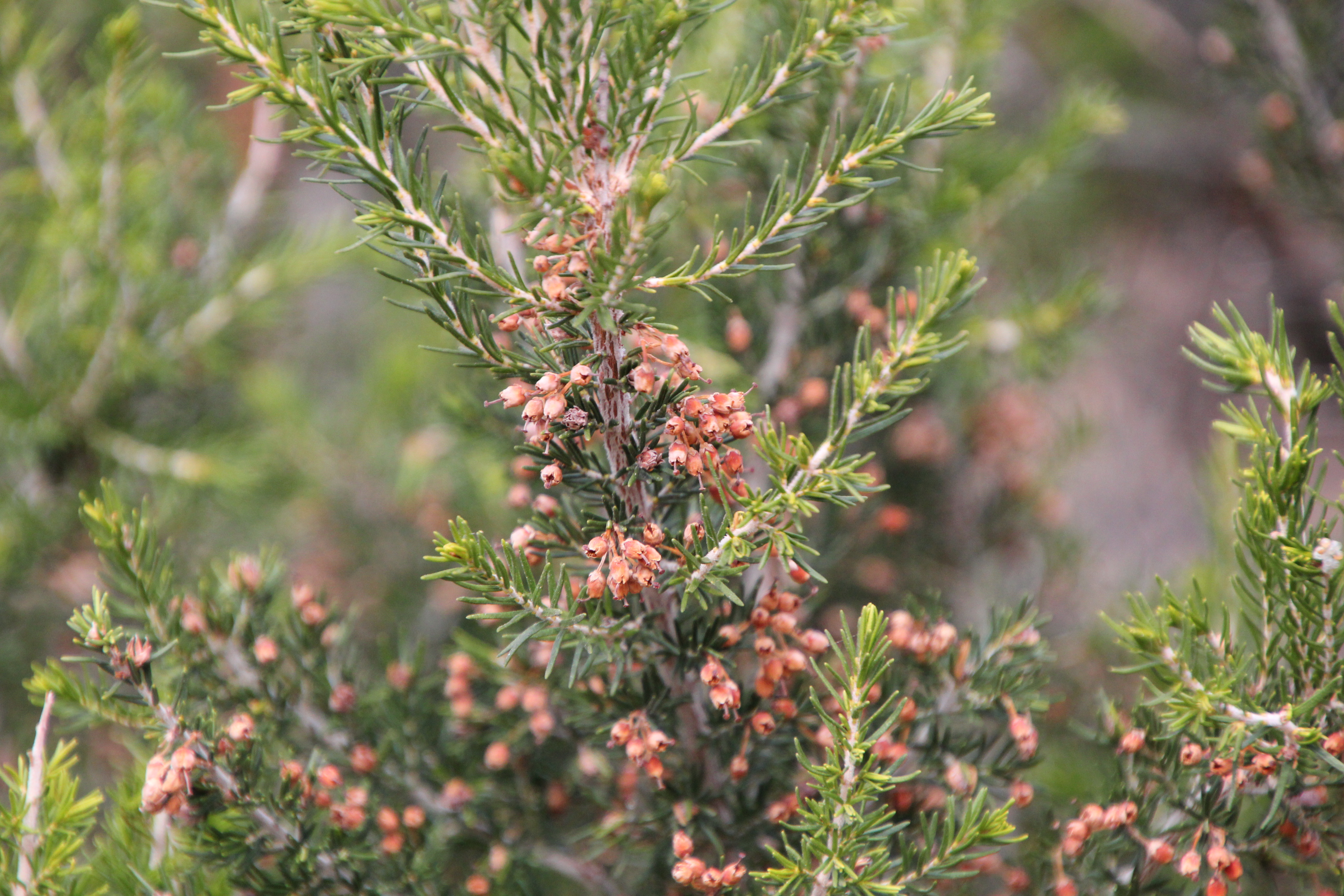 Flora della Sardegna